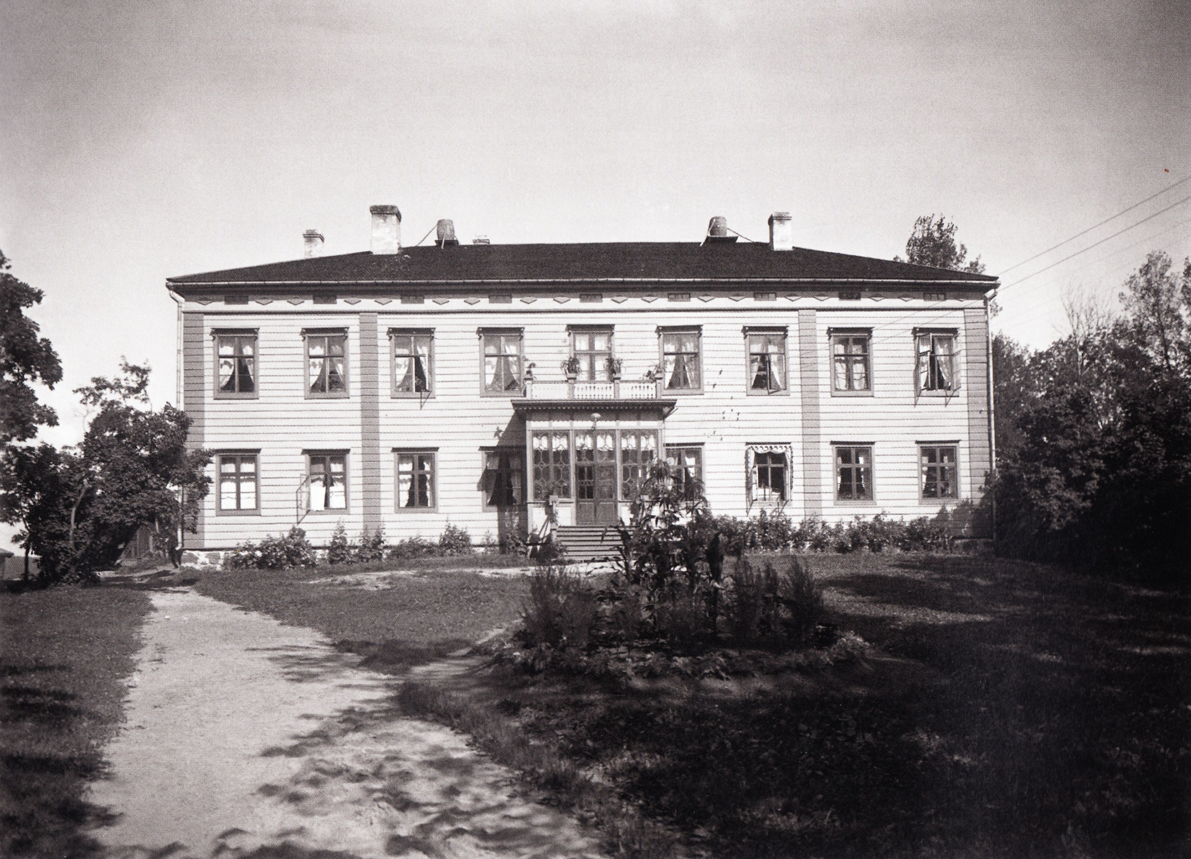 Olkkalan uusi päärakennus